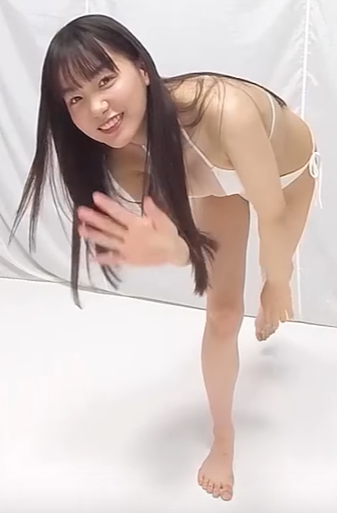 吉澤遥奈です。